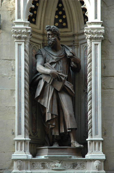 Imatge de Sant Lluc. Giambologna. Orsanmichele, Florència